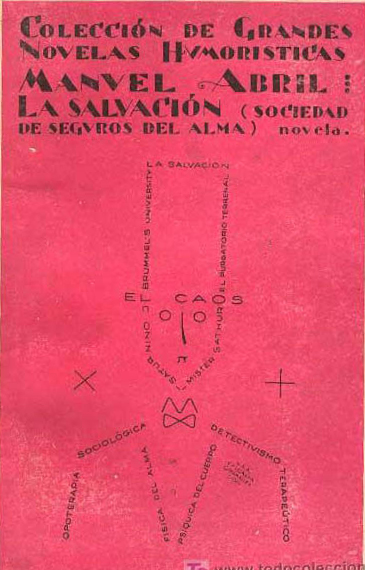 Libro La Salvacion